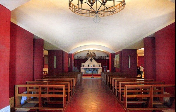 Cripta del Santuario de Montevergine, con la tumba de Guillermo de Vercelli